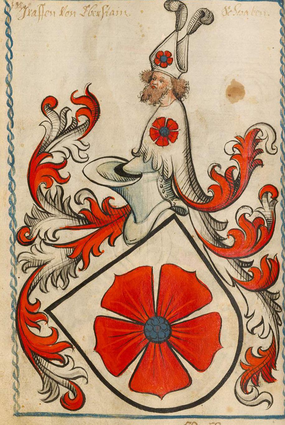 Scheibler'sches Wappenbuch, älterer Teil Eberstein